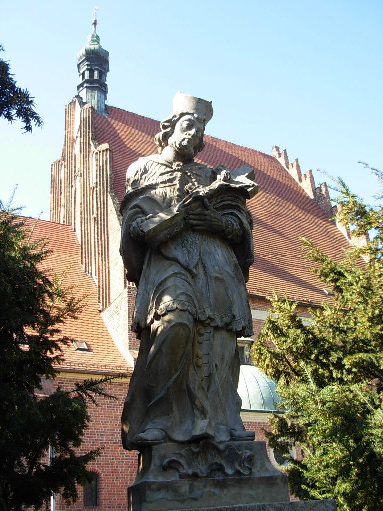 Figura św. Jana Nepomucena przez katedrą w Bydgoszczy